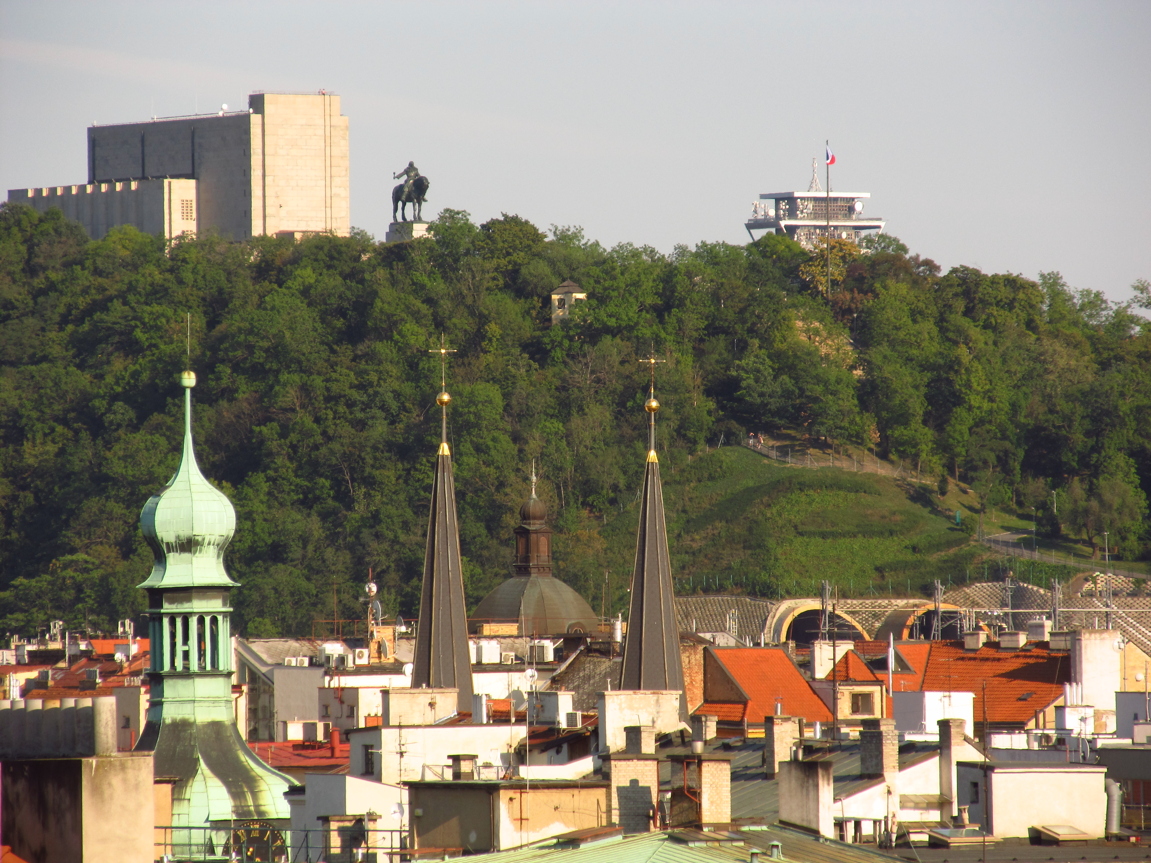 Česky: Pohled z Novomlýnské vodárenské věže směrem k Vítkovu.